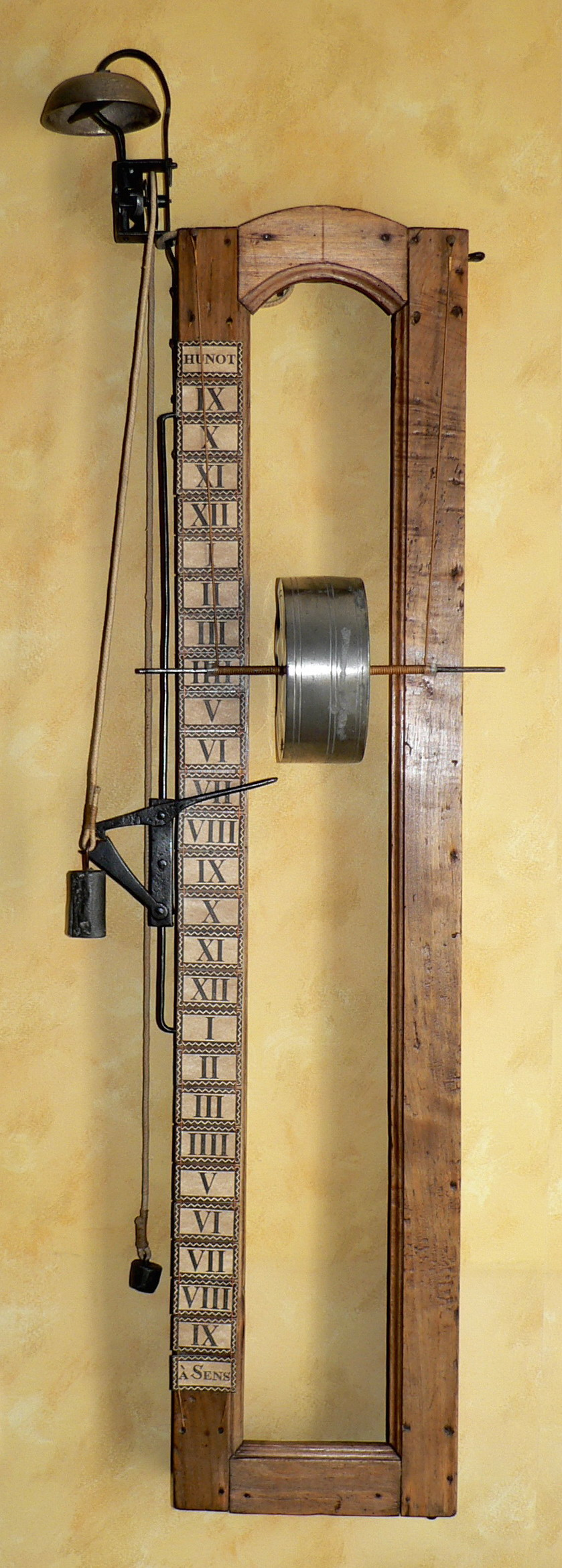 "Clepsydre" à tambour, XVIIIe siècle, de la Société Archéologique des Musées de Sens.